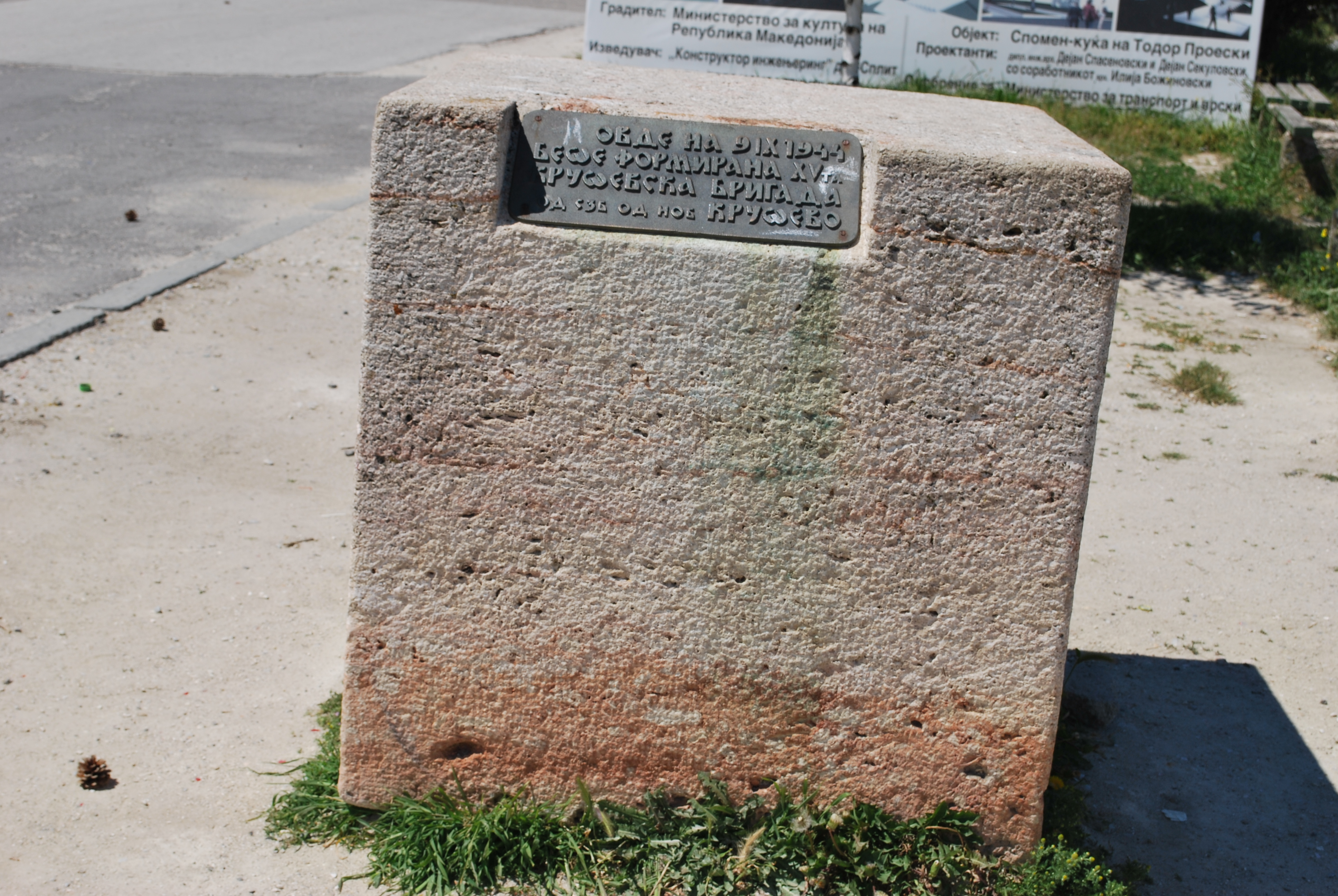 Споменик на крушевската бригада